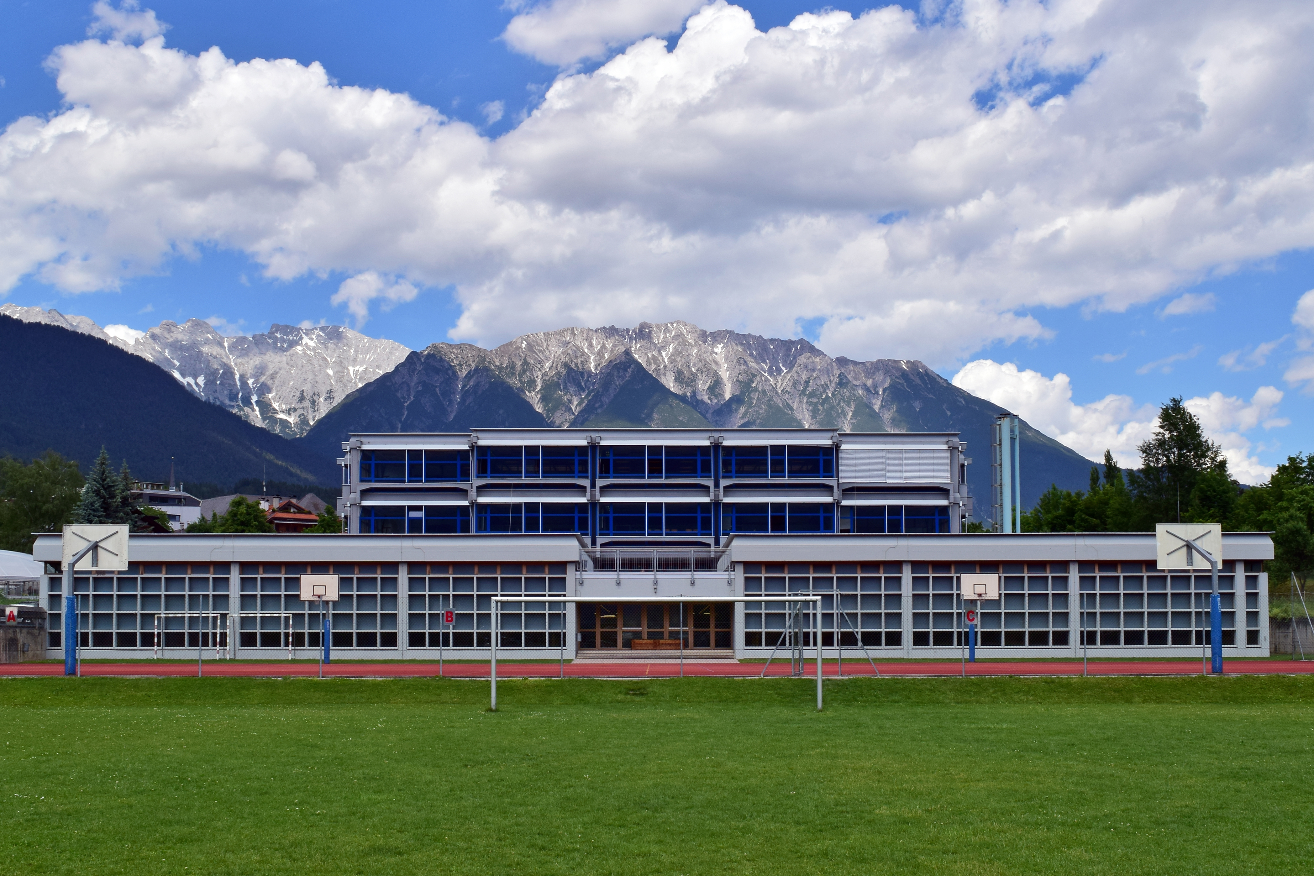 Bundesrealgymnasium Imst, errichtet 1970-1973 (lt. Tiroler Kunstkataster)